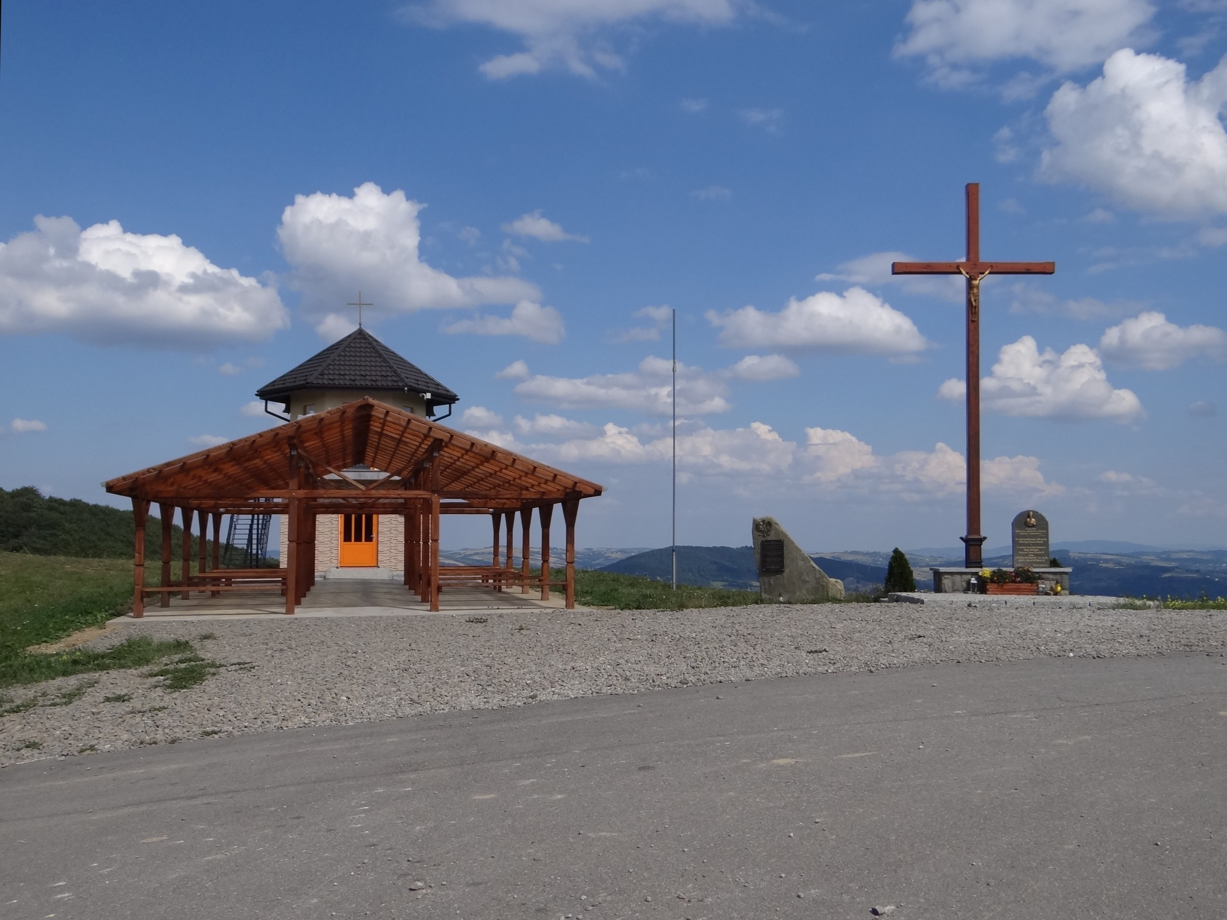 Białowodzka Góra. Ołtarz polowy